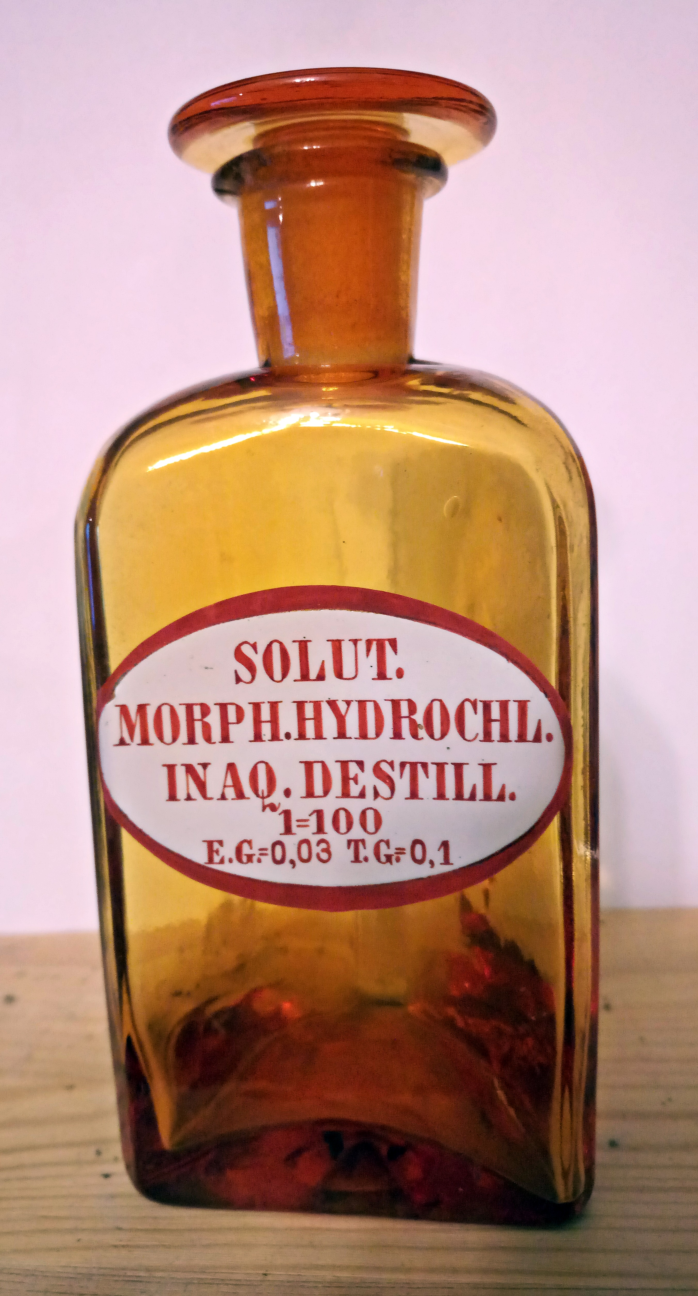 Flasche für Morphinhydrochlorid Lösung, um 1900 (aus der Schwanen-Apotheke Grünstadt)